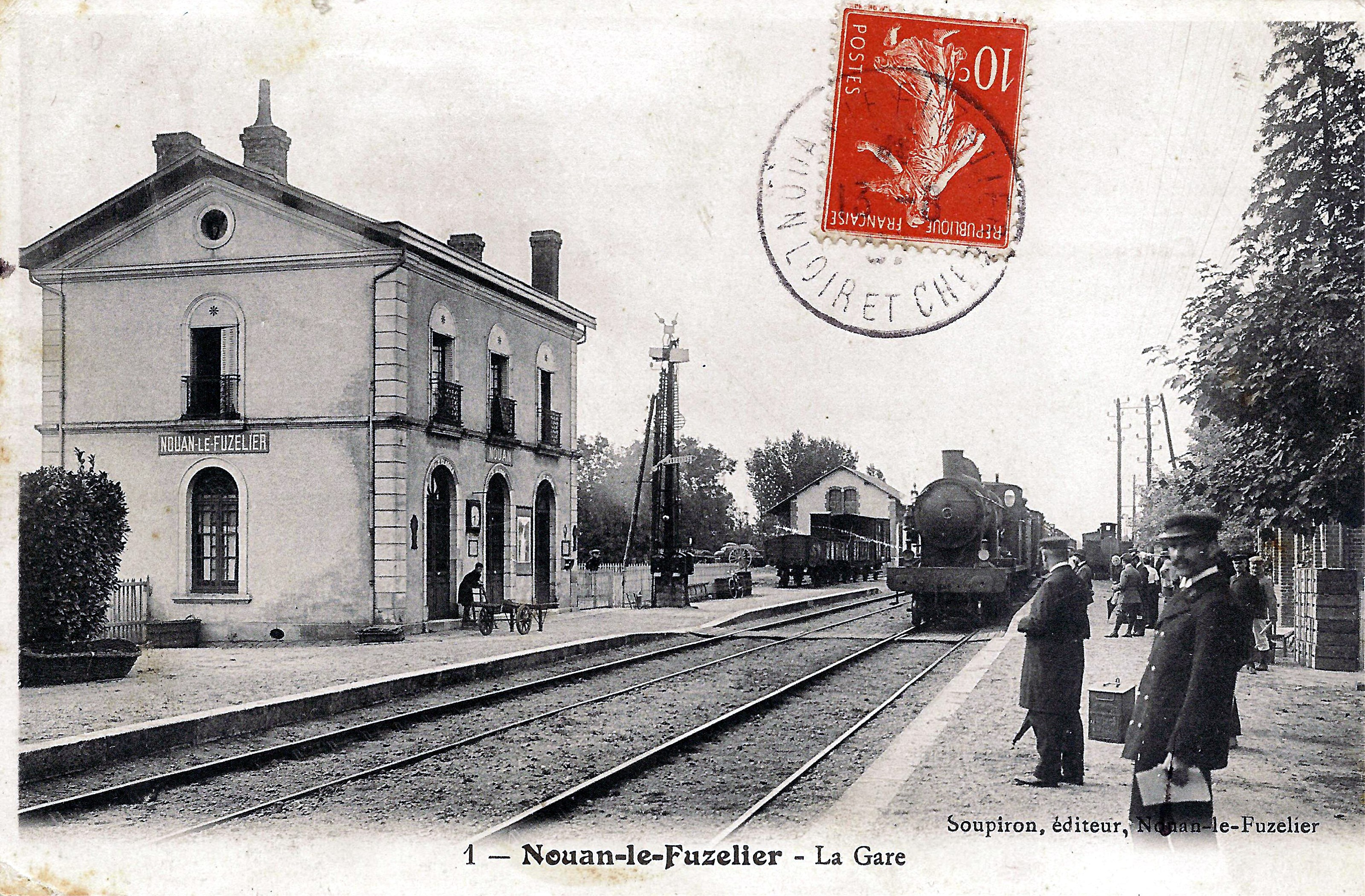 Nouan-le-Fuzelier, Loir-et-Cher, France : La gare